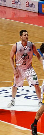 Ian O'Leary